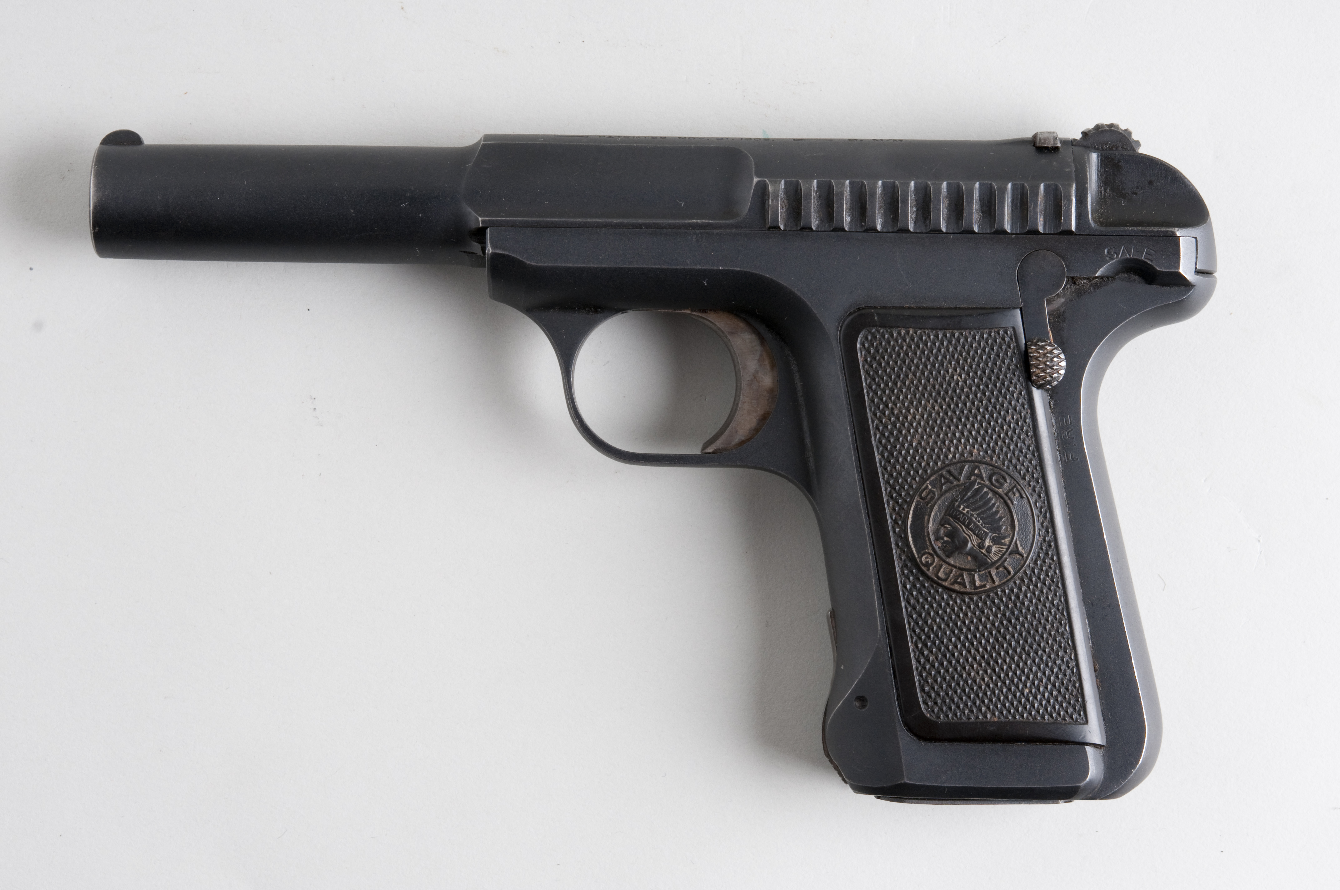 Savage 1907 From flickr user handvapensamlingen - Pistols used in Norway.